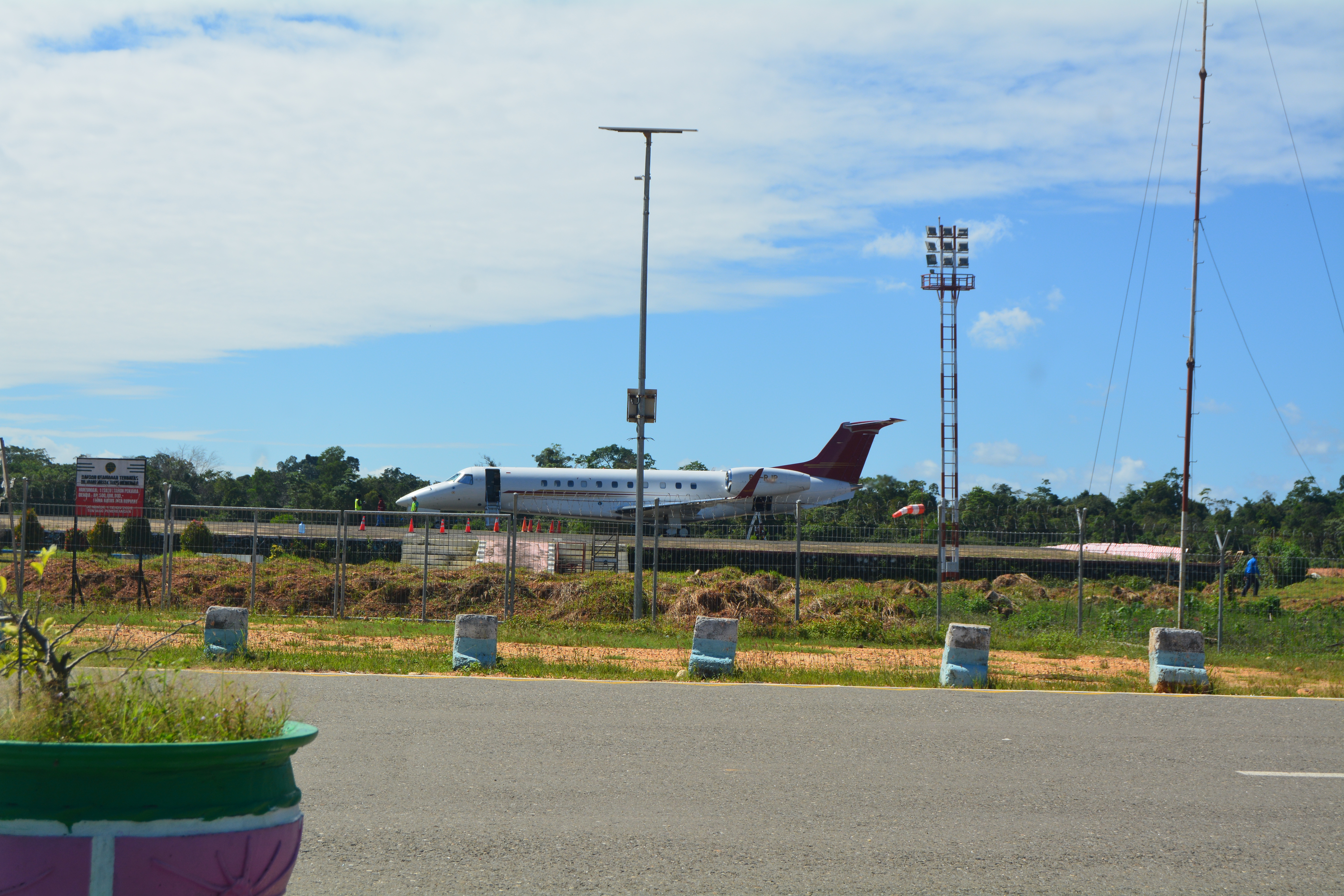 Pesawat TransNusa ATR72 sedang melayani penerbangan di Bandar Udara Sangia Nibandera